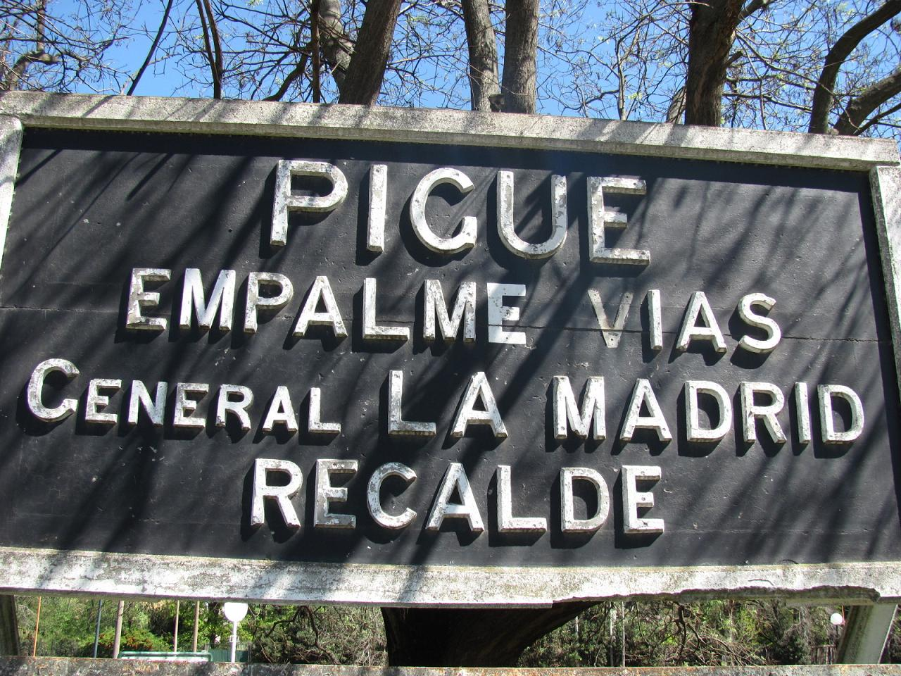 Estación Pigüé, Provincia de Buenos Aires.